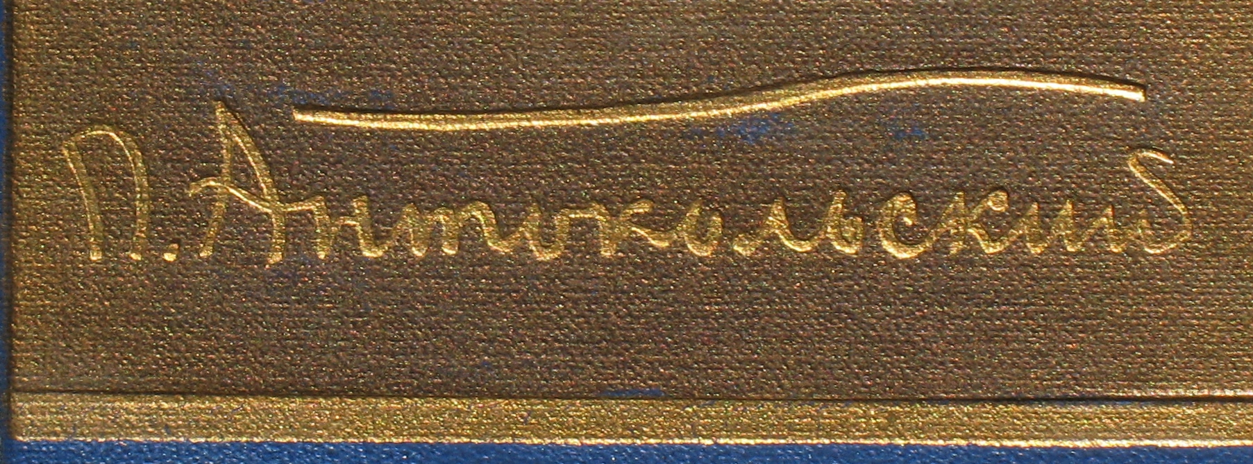 Soviet poet Pavel Antokolsky signature on his book.